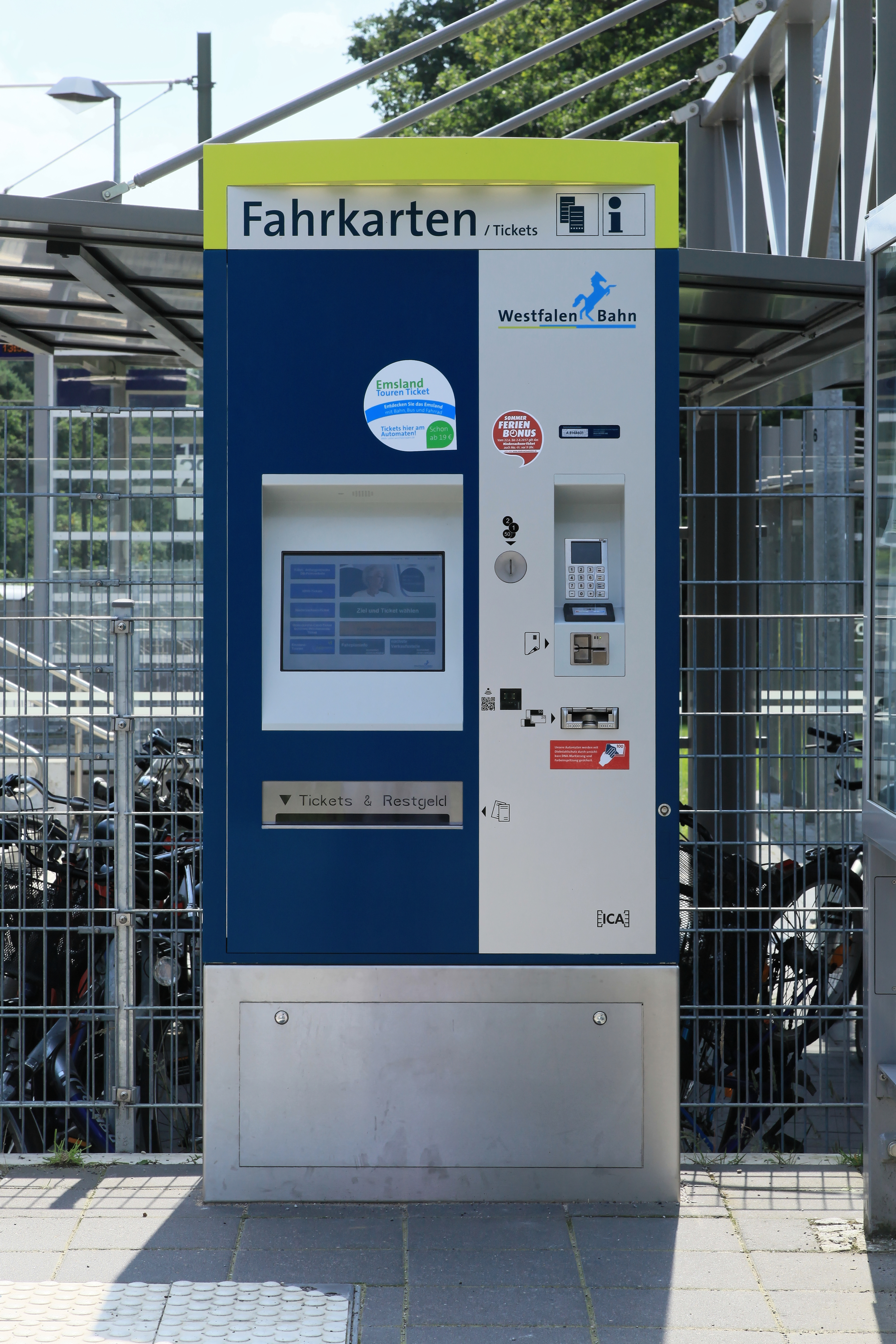 Zweigeteilter Bahnhof Dörpen, je ein Bahnsteig nördlich und südlich des Bahnübergangs, Neudörpener Straße (Hauptzweig) in Dörpen